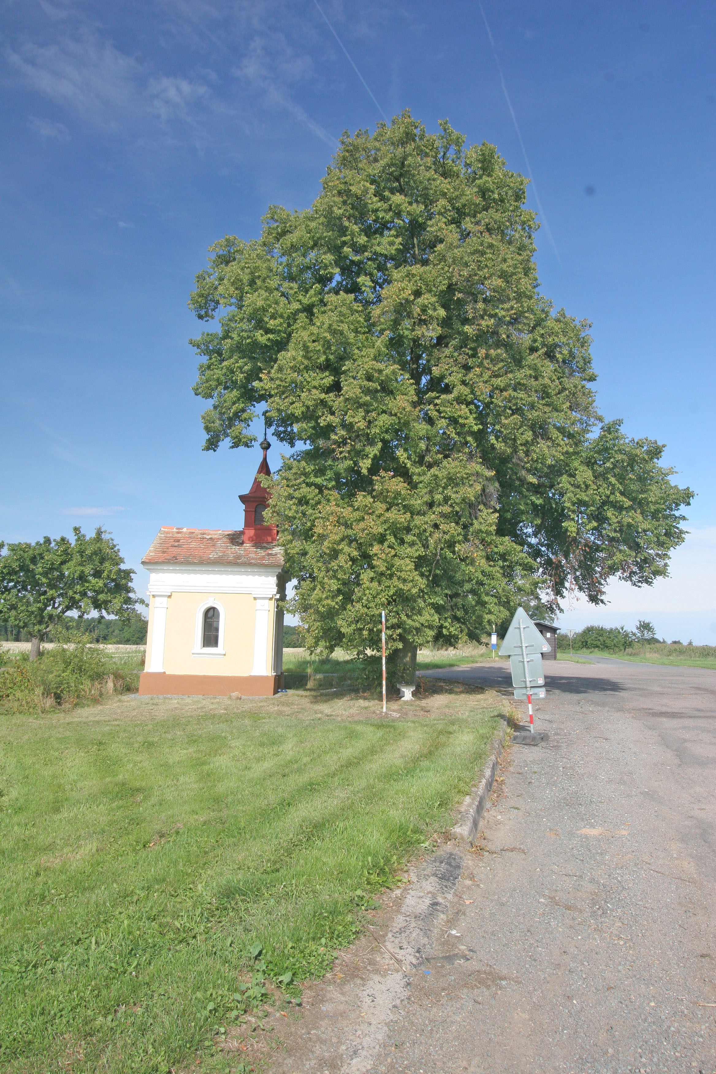 Urbanice kaplička